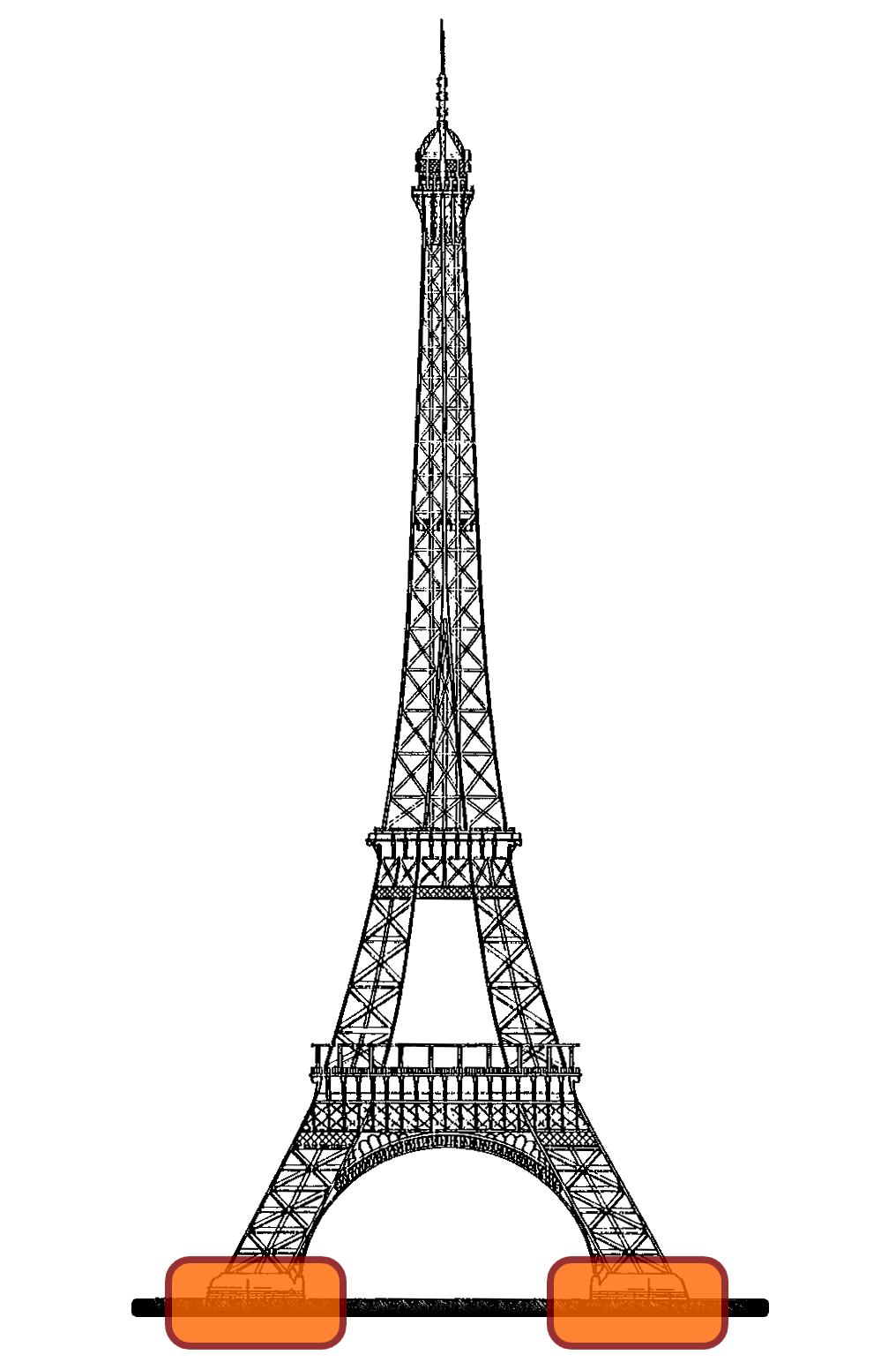 Les étages de la tour Eiffel